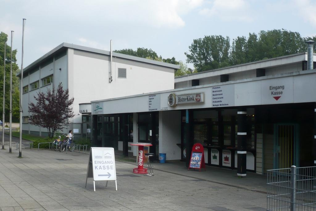 Schwimmzentrum Oststadt in Essen-Freisenbruch